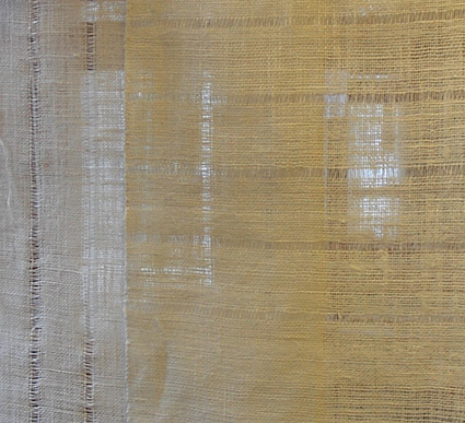 Gardin i två tyg med gles varp och gles i inslag. Till vänster gles varpeffekt, till höger gles inslagseffekt. Således fordras två uppsättningar för att åstadkomma tygerna. Se även Detalj av gardin med glesa ränder och Detalj av gardin med glesa inslag.